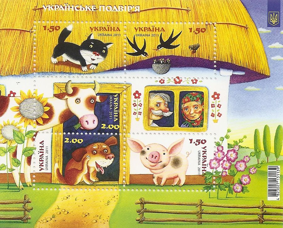 Блок: «Українське подвір'я» (№ 91). Блок з п’яти марок: № 1109 (котик), № 1110 (ластівки), № 1111 (корова), № 1112 (собака), № 1113 (порося). Формат блока — 116х94 мм. Формат марок: 36,54х22,62 мм. Номінал марок № 1109, № 1110, № 1113 – 1,50 грн. Номінал марок № 1111, № 1112 – 2,00 грн. Тираж блока — 132, 000 примірників. Захист блока: мікротекст "К.Лавро". Захист кожної марки: в УФ променях світяться частини тіла тварин та птахів. Перфорація рамкова — 11 1/2. Поля блока художньо оформлені. Дизайн блока Костя Лавро. Дизайн штемпеля Євгенія Бородая. Блок — багатоколірний; спосіб друку – офсет. Блок надруковано на ДП "Поліграфічний комбінат "Україна" по виготовленню цінних паперів". На полях блока штриховий код 4823027131139.